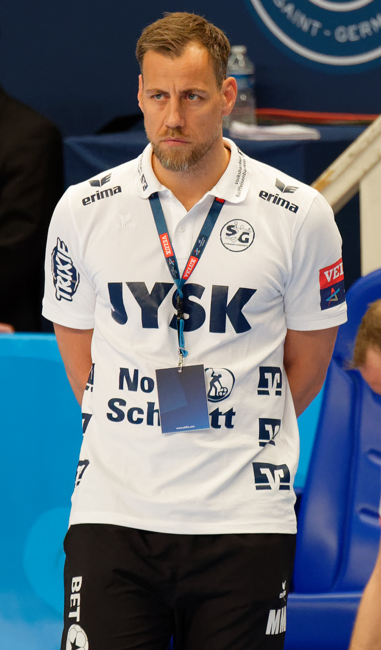 Rencontre de phase de groupe de la ligue des champions 2017/18 entre le PSG et SG Flensburg. A Coubertin, le 17 février 2018.